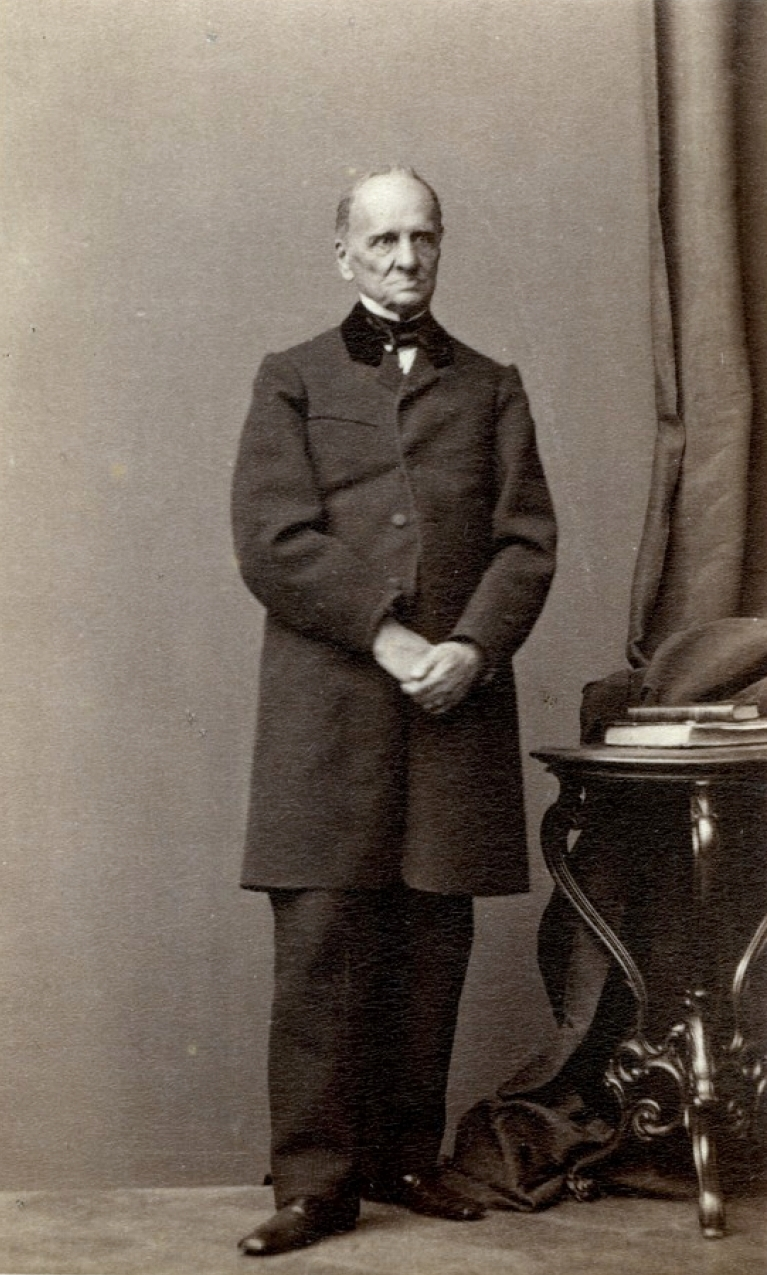 Пеликан, Вацлав